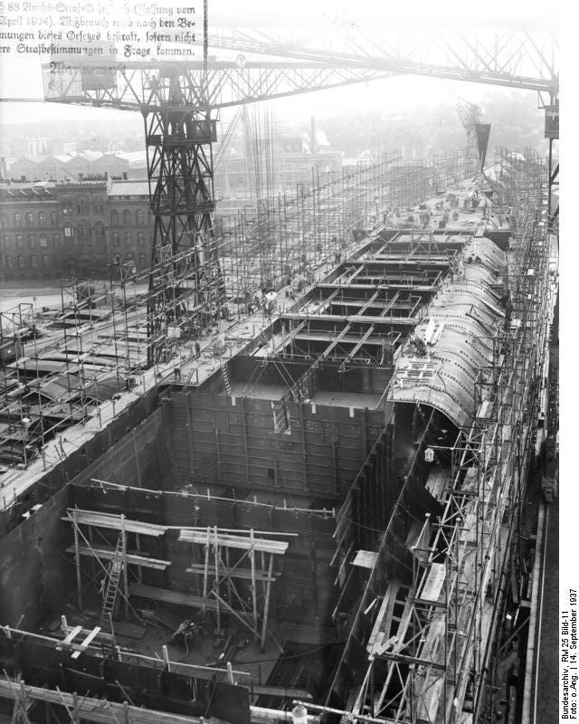 Flugzeugträger "A". Baustadium Aufgen. am 14.9.1937 Deutsche Werke Kiel